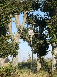 Maisnières (Somme, France) Calvaire (croix de mission) dressé à l'entrée de Maisnières en venant de Tours-en-Vimeu.